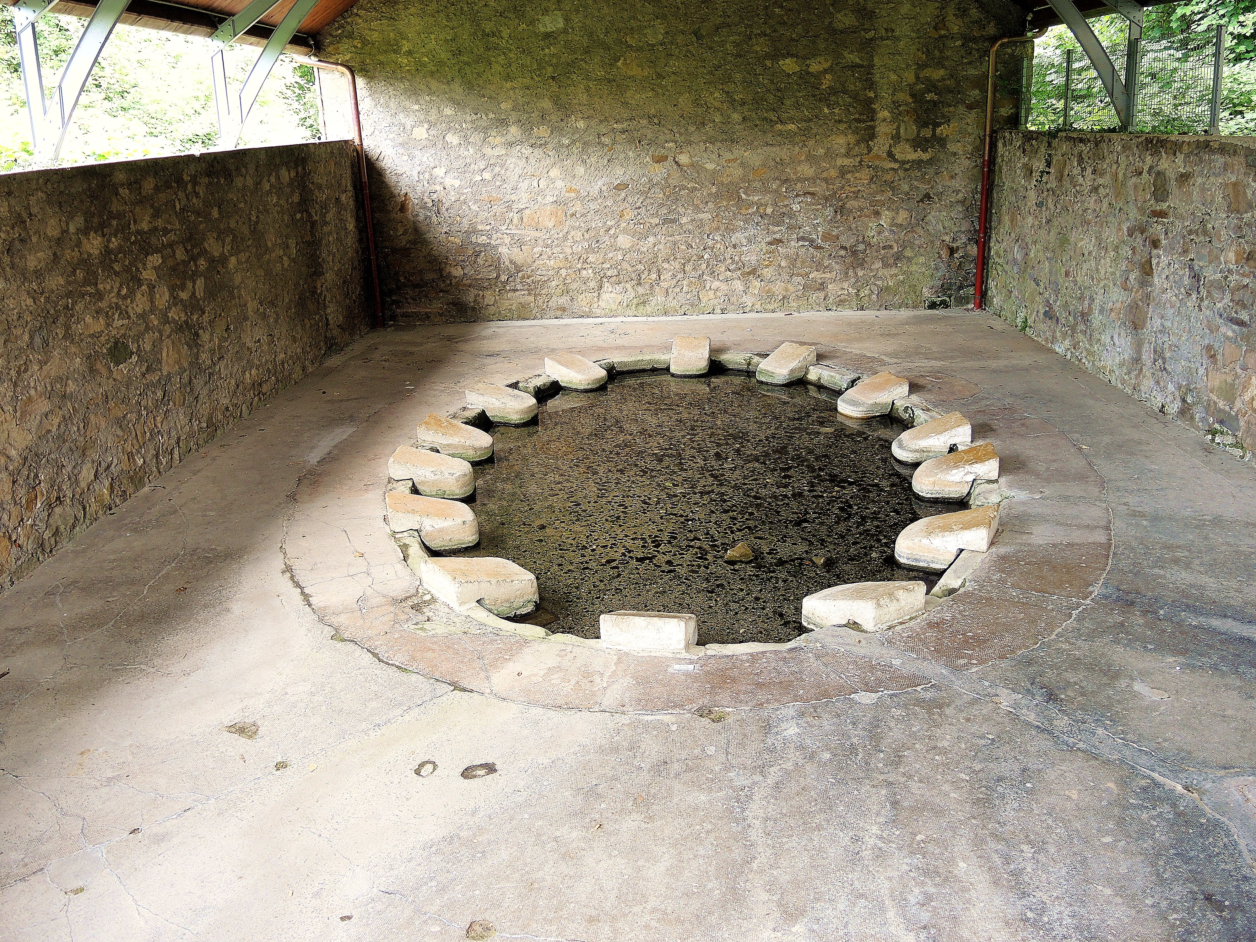 Ancien lavoir couvert dans la ville basse de Thon-les-Bains.